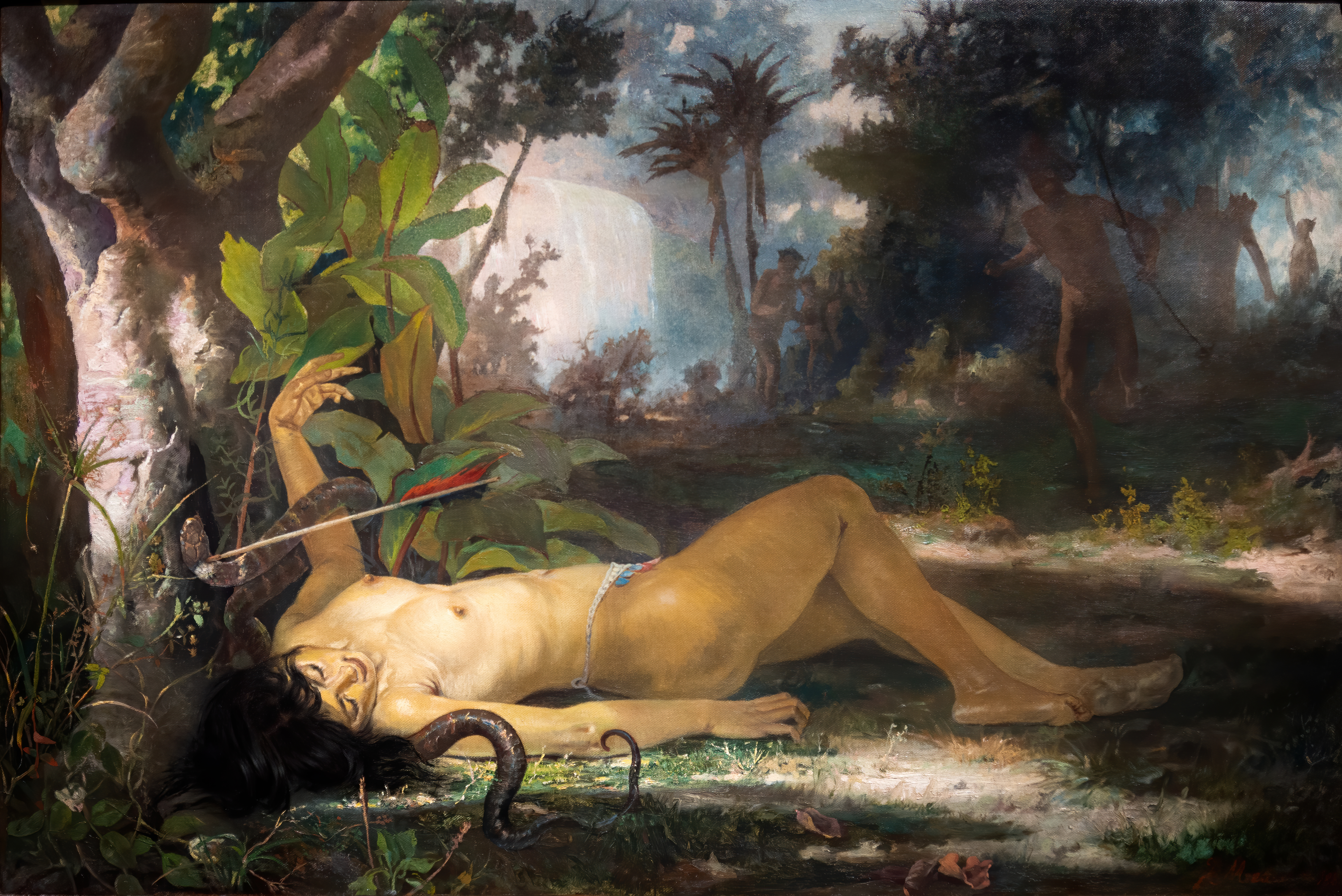 Pintura que retrata o episódio do poema épico O Uraguai, de Basílio da Gama, em que o irmão da índia Lindoia mata, tarde demais, com uma flechada a serpente que ela usou para se suicidar. Medeiros procura captar o espírito do autor que diz ser bela a morte em Lindoia.